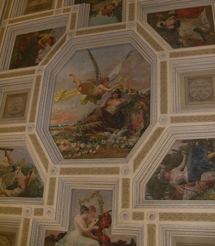 Affreschi di Agretti nella biblioteca "Mazzini" a La Spezia